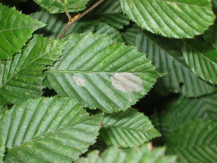 Minen von Phyllonorycter esperella